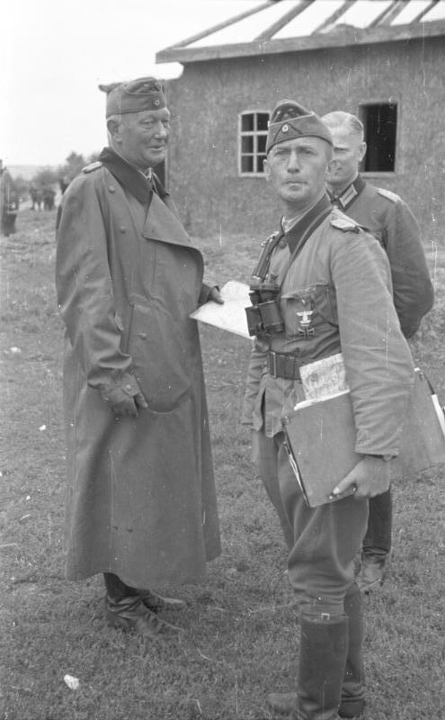 Angriff auf Krementschug, vorn Oberstltn. von Ahlfen, 7.9.1941